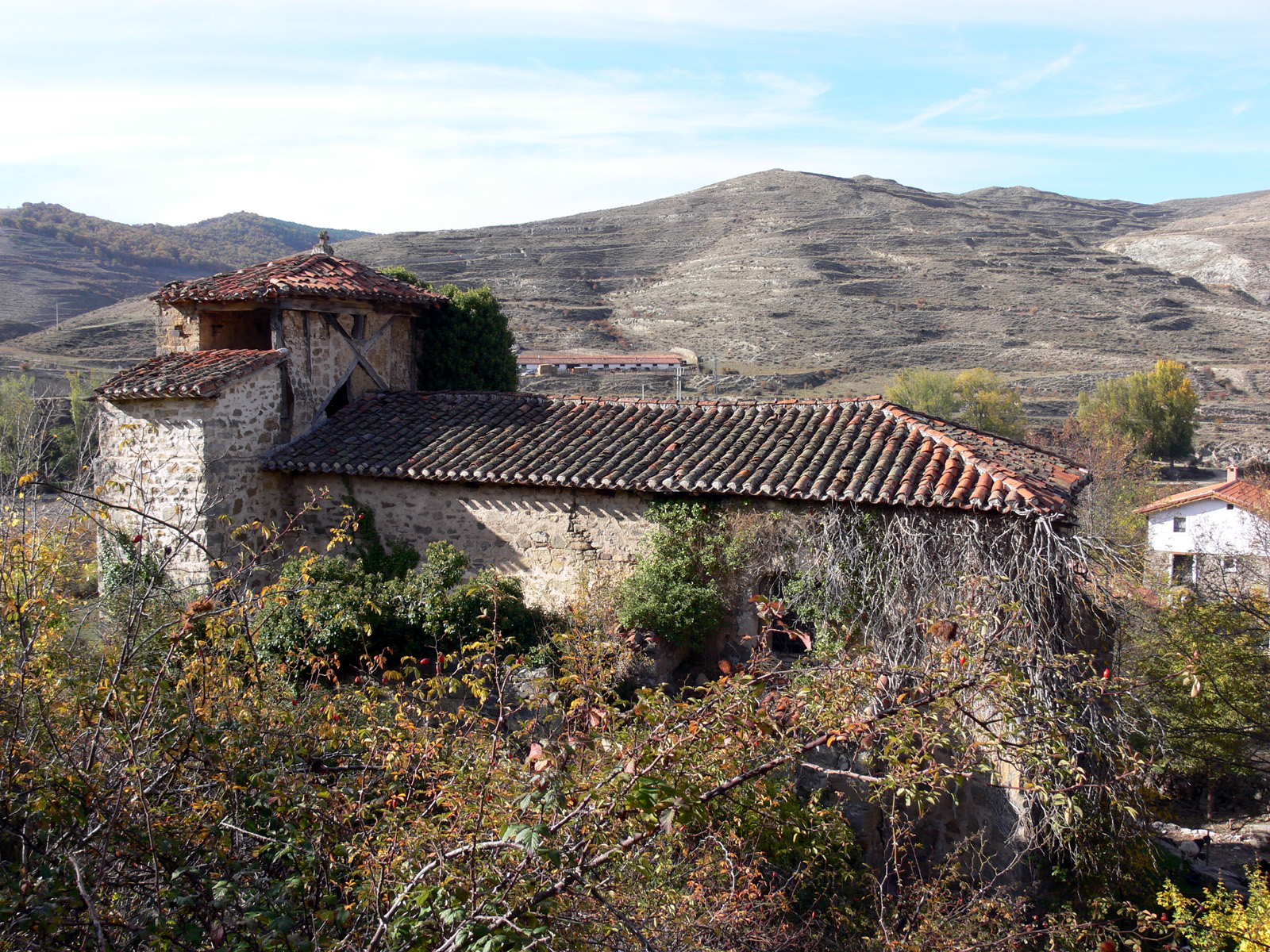 Iglesia de la Purísima Concepción en Velilla, aldea de San Román de Cameros (La Rioja, España)